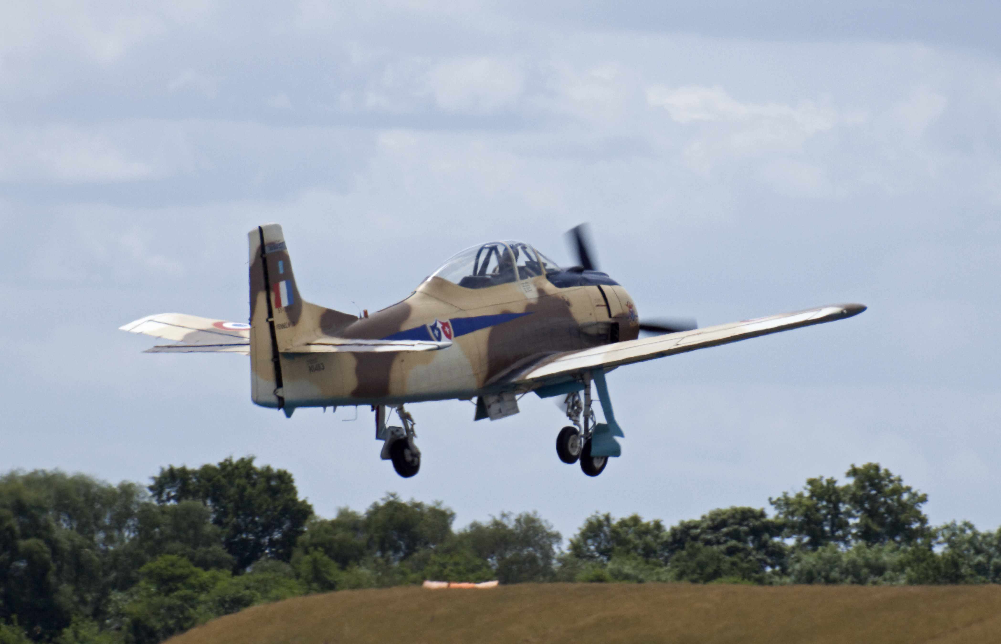 T28 Fennec